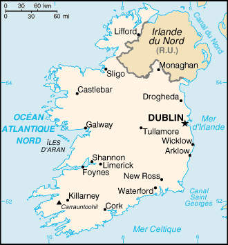 carte Irlande - origine CIA World Factbook